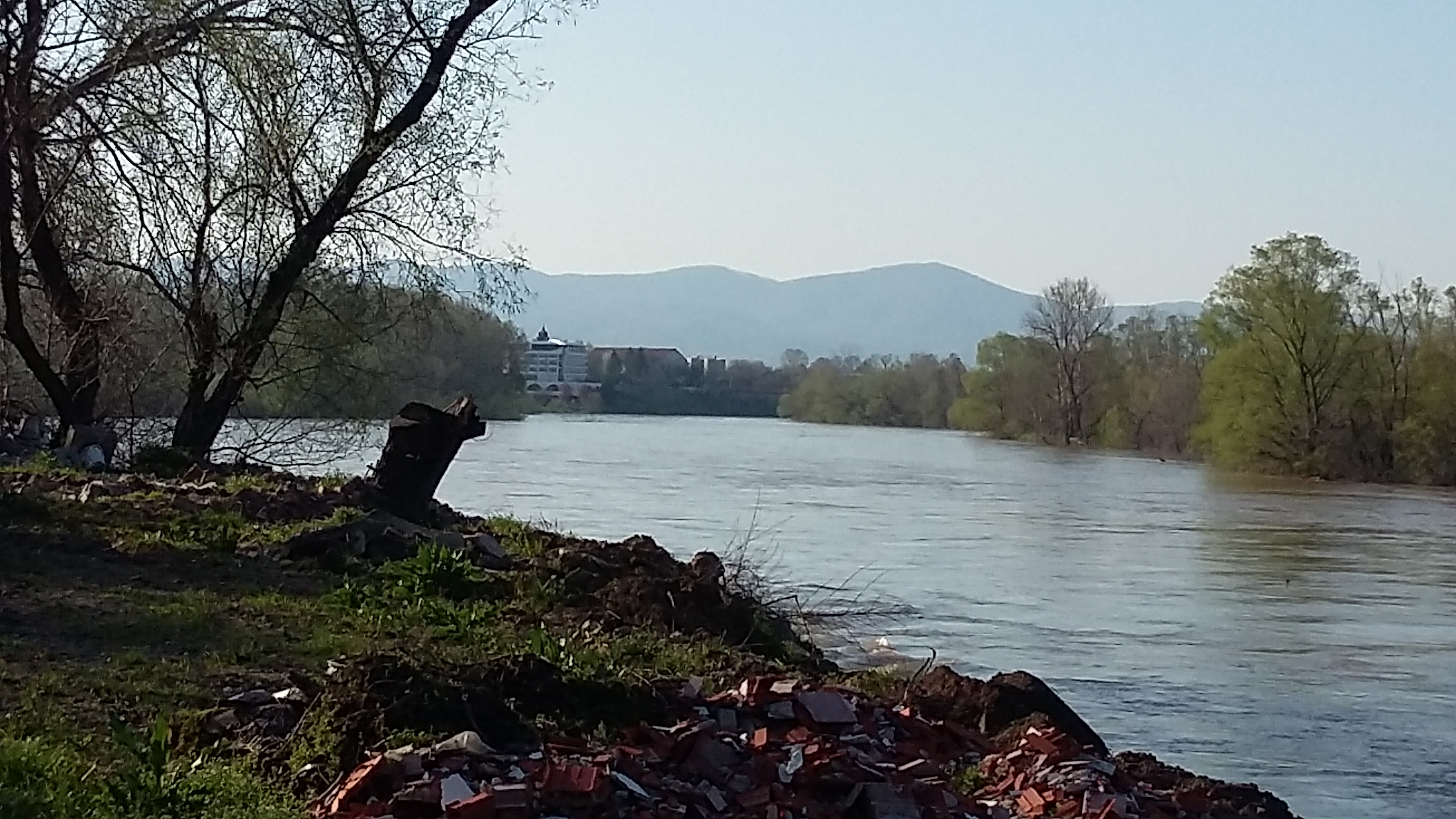 Поглед на Варварин са обале Мораве